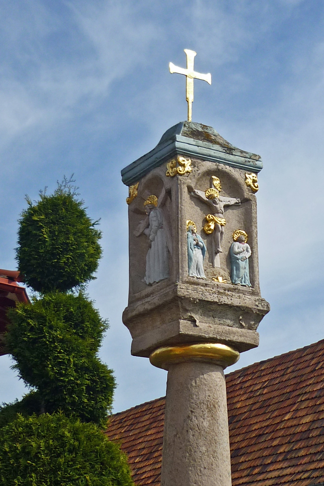 Bildstock in Cunnewitz neben der Kapelle Hornjoserbsce: Stołp pódla Konječanskeje kapałki.